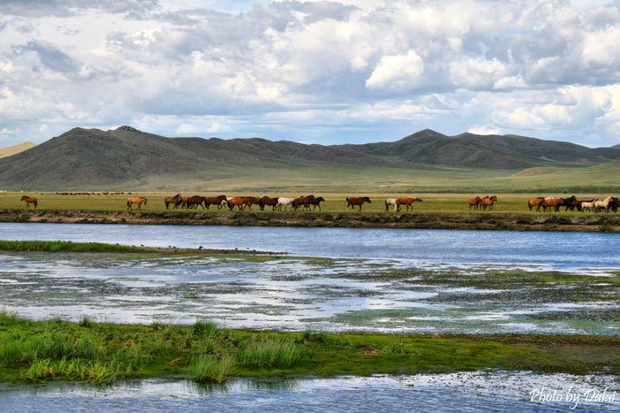 Монгол: Төв аймгийн зуны байгаль